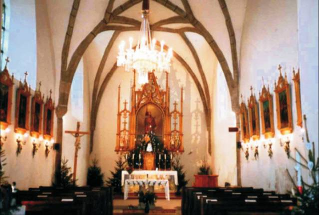 Interiér